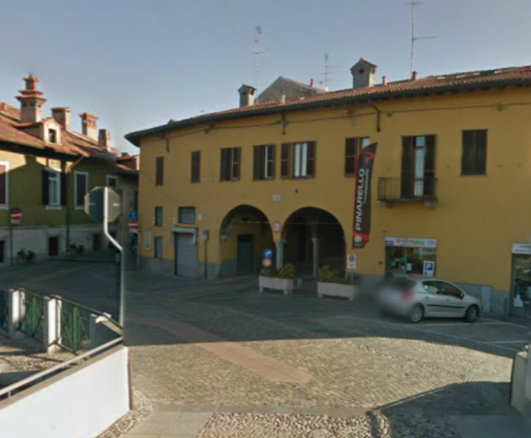 Veduta della grangia certosina a Boffalora sopra Ticino (MI) - Italy